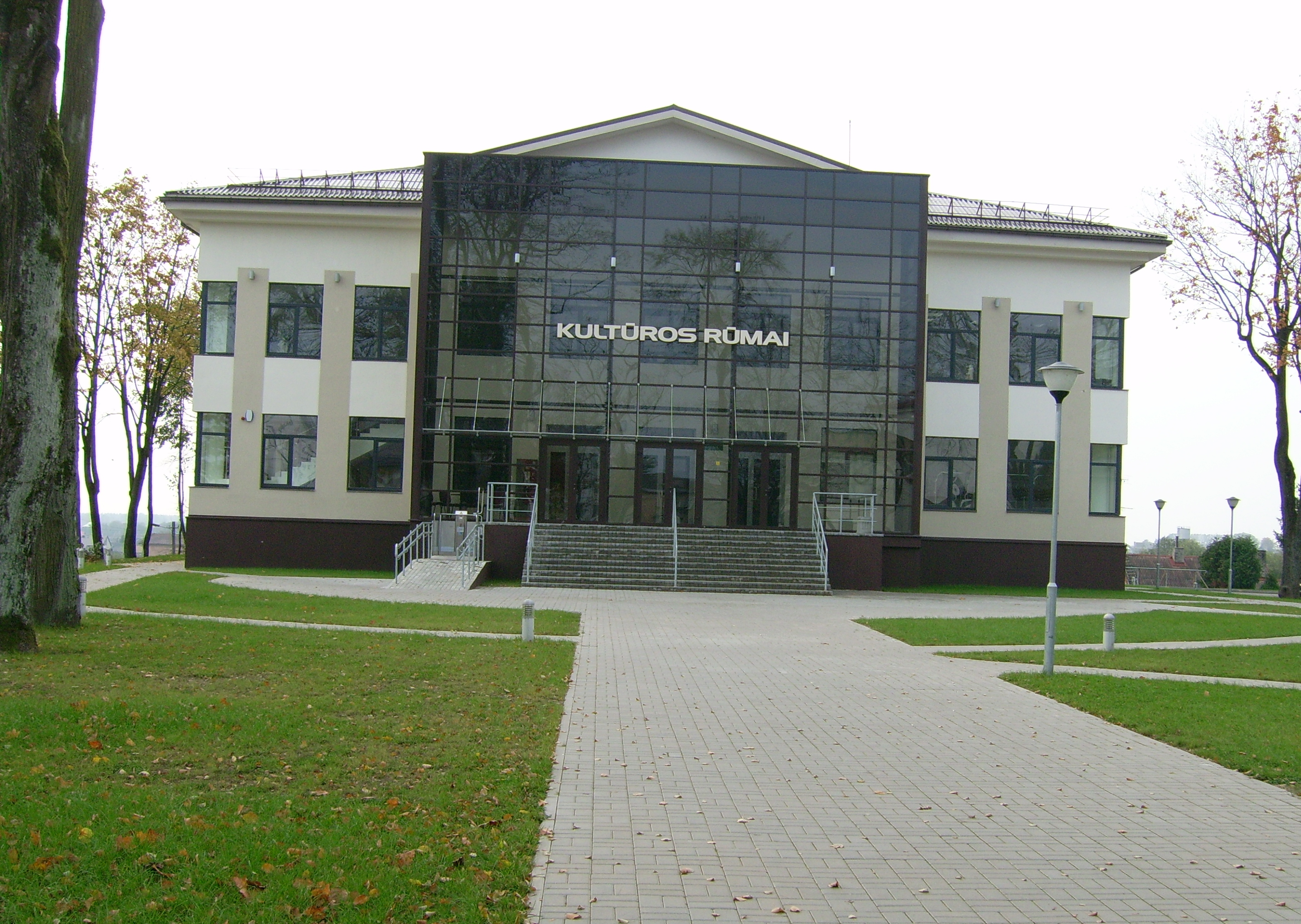 Tauragės kultūros rūmai